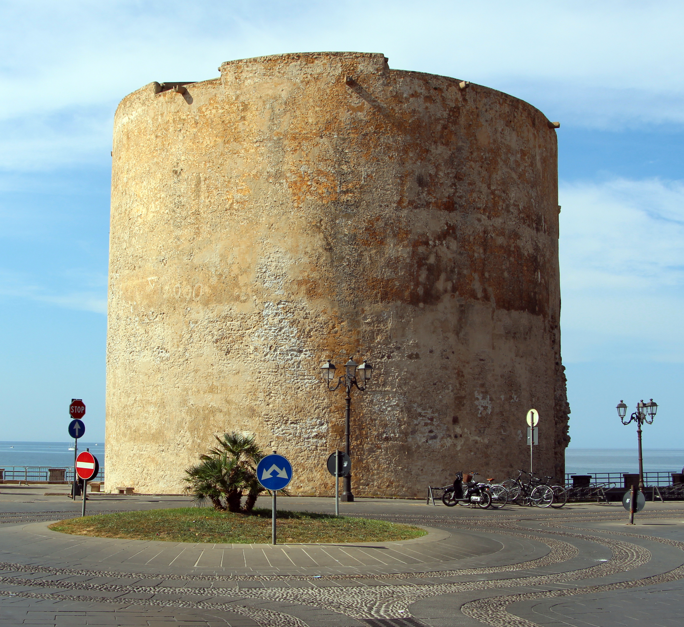 Alghero, mura e altri edifici